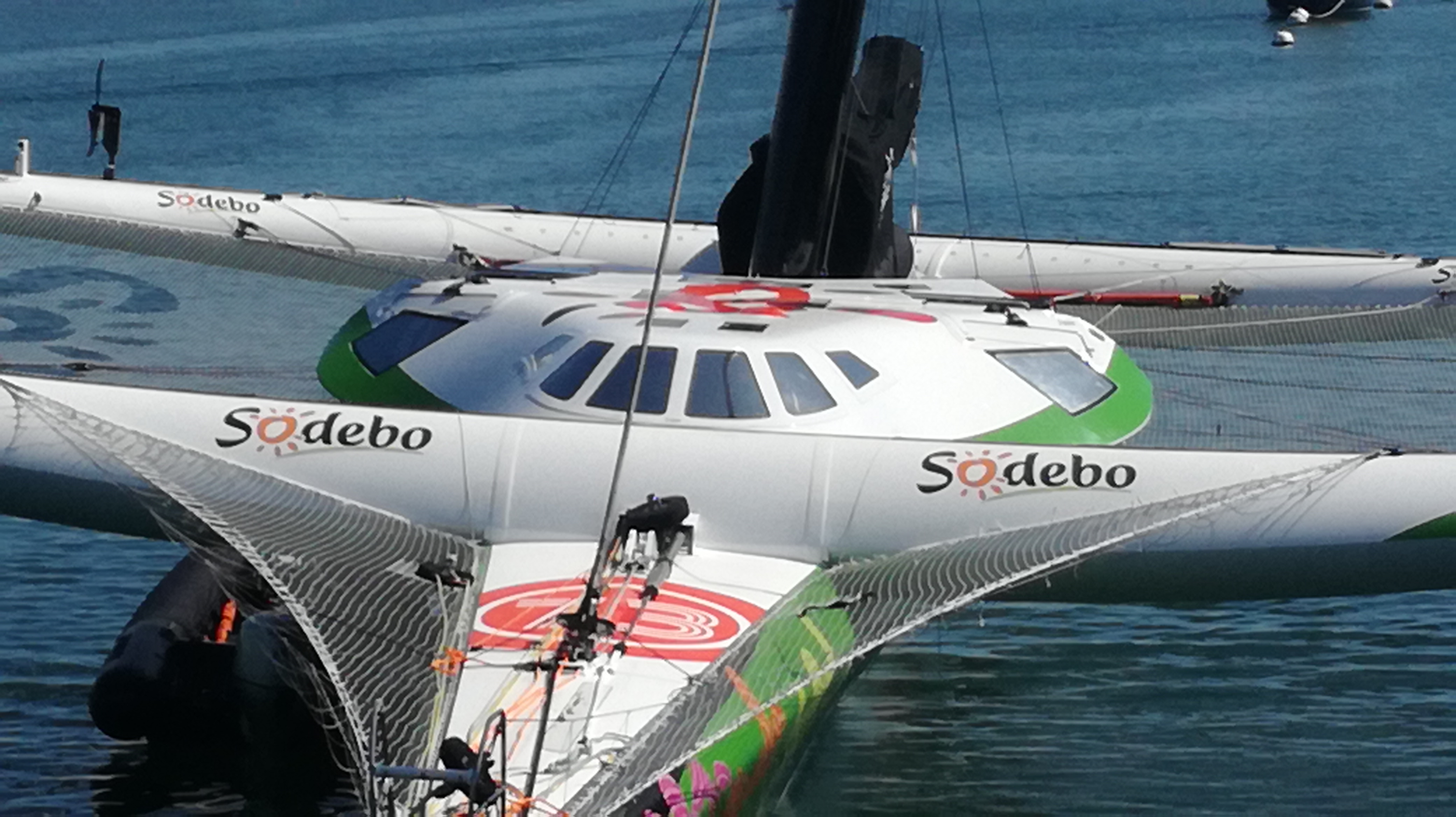 Zoom sur le cockpit de Sodebo Ultim 3, où on peut observer le fait qu'il est en avant du mât et que la vue sur l'avant est dégagée. Photo prise à la Trinité-sur-Mer le 22 août 2019.